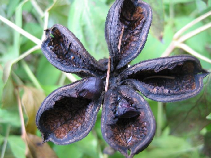 Paeonia_suffruticosa (Guelph arboretum).jpg